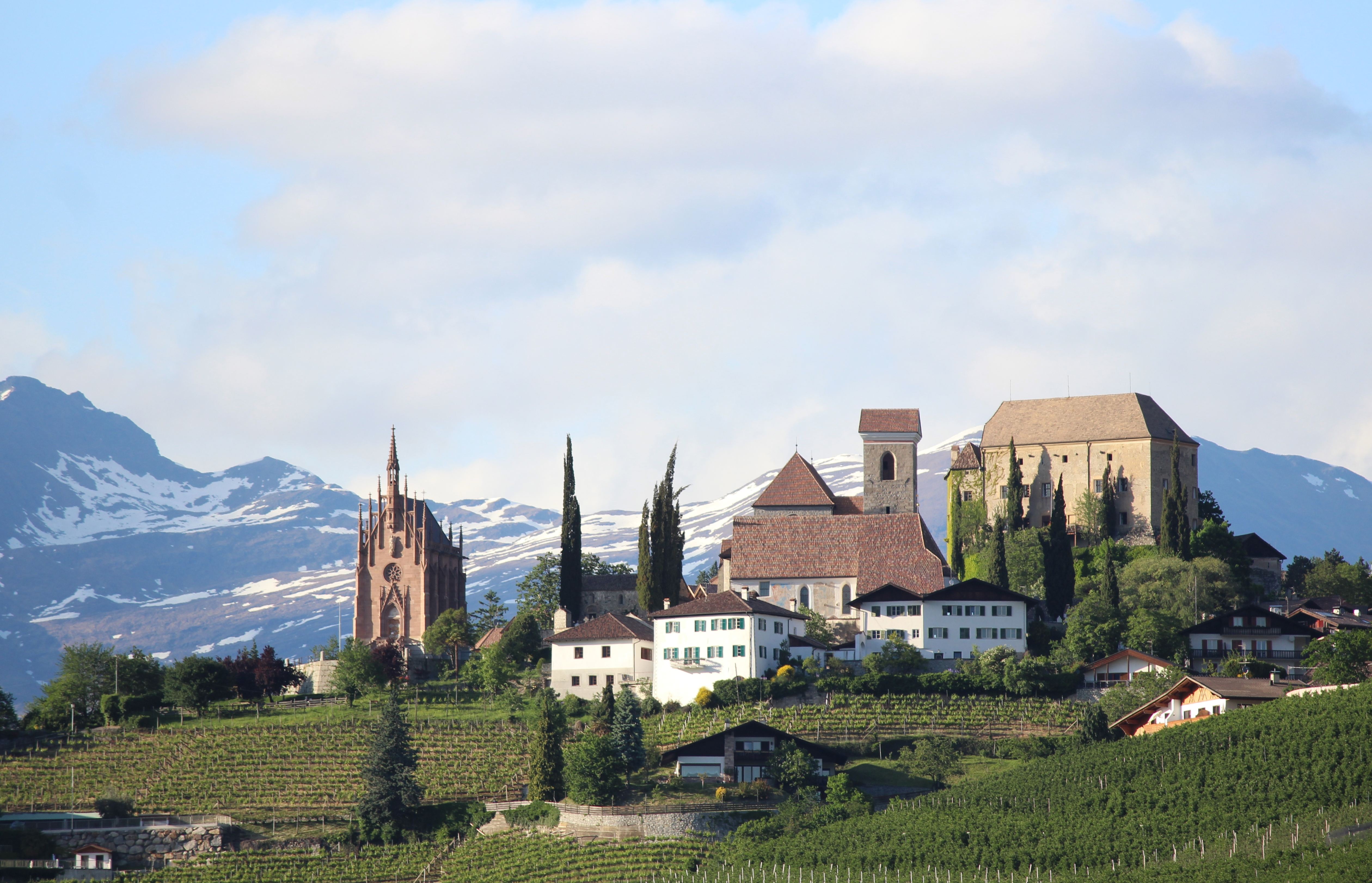 Mausoleum, Schloss Schenna, Pfarrkirche Maria Himmelfahrt